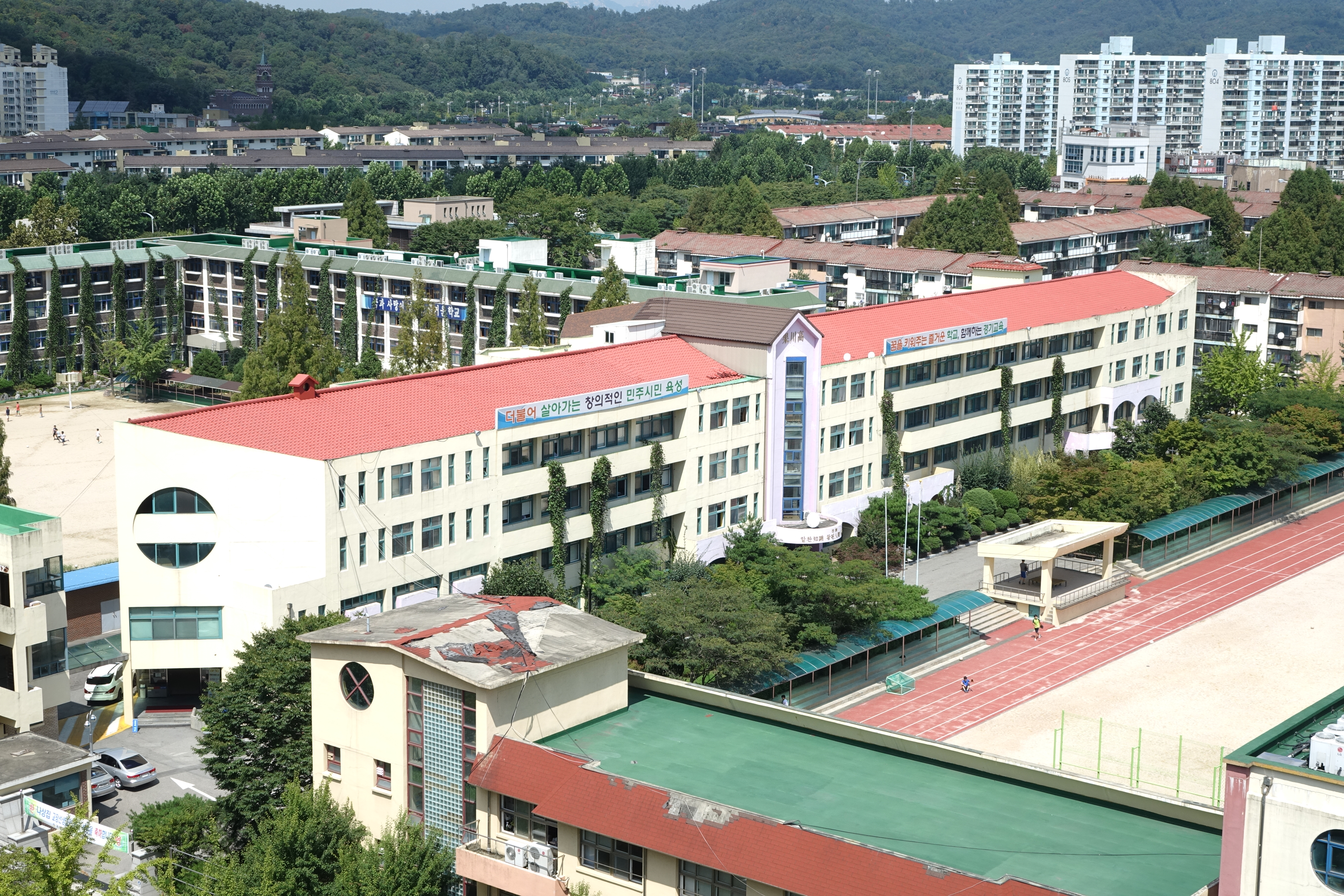 2014년 9월 경기도 과천시